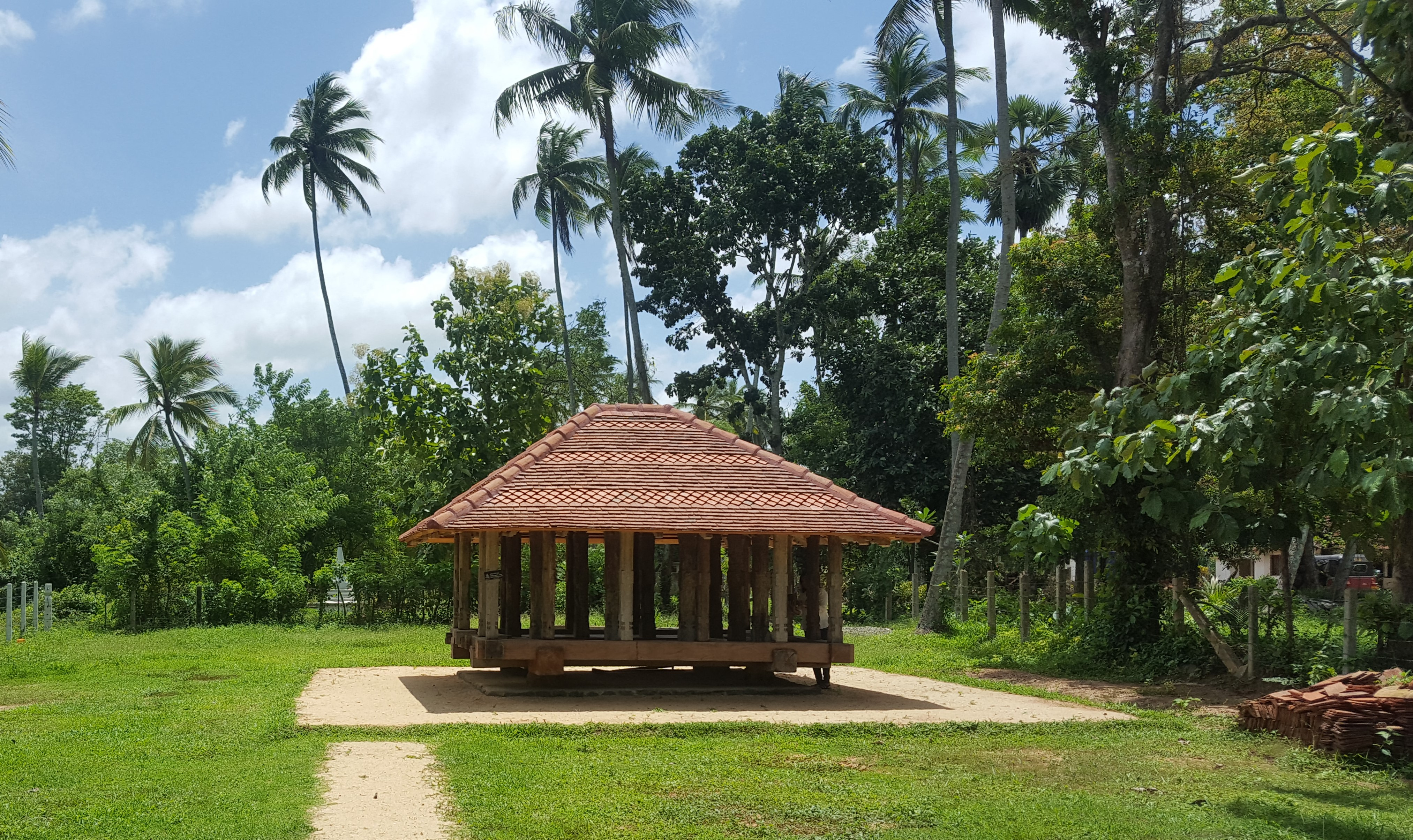 සිංහල: පනාවිටිය අම්බලම